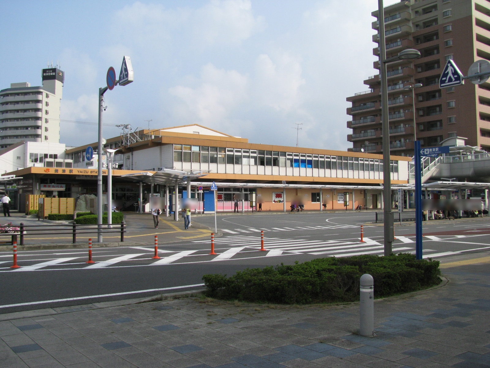 東海道本線焼津駅